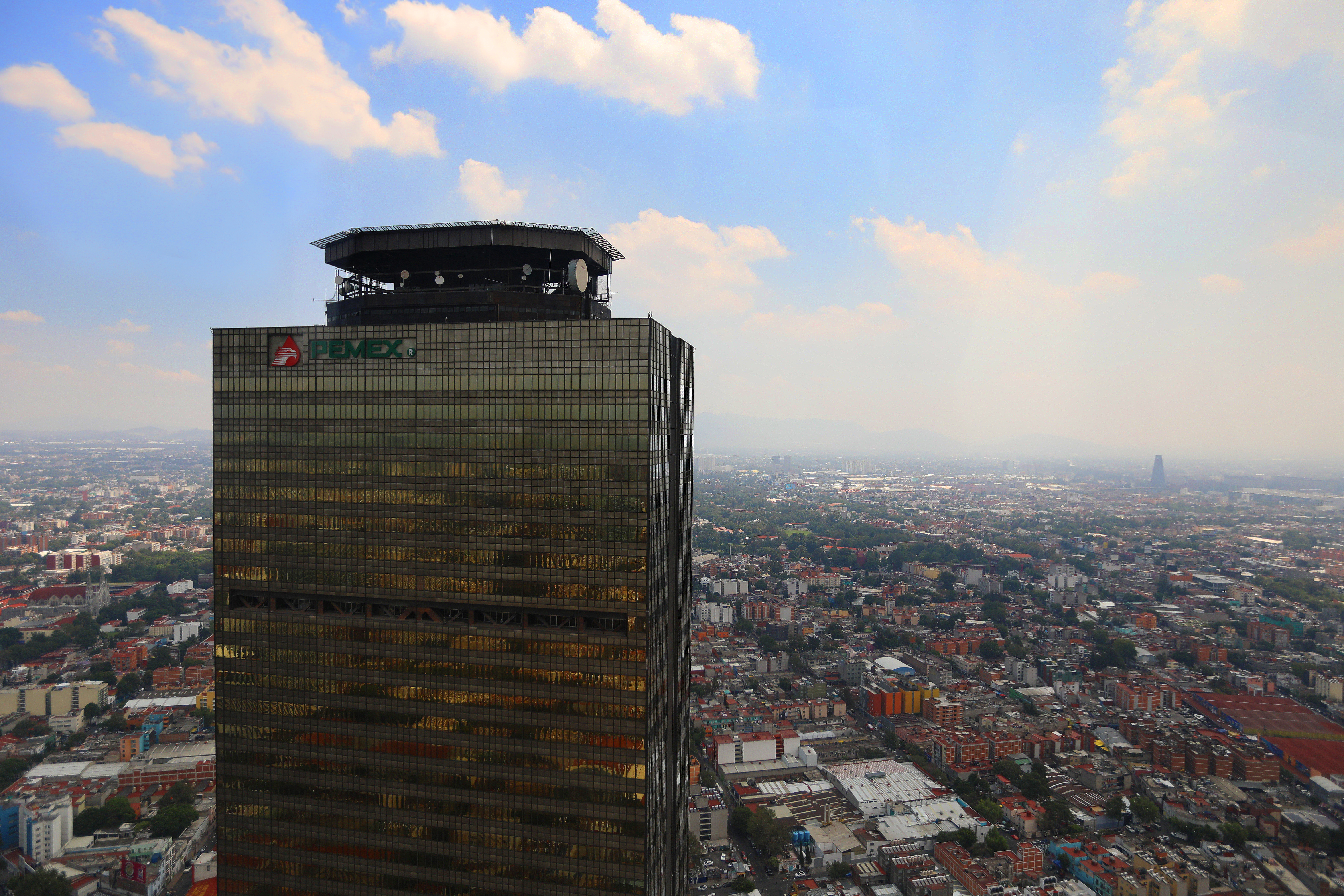 En primer plano, la Torre Ejecutiva Pemex. Fotografías de la Ciudad de México desde el aire.